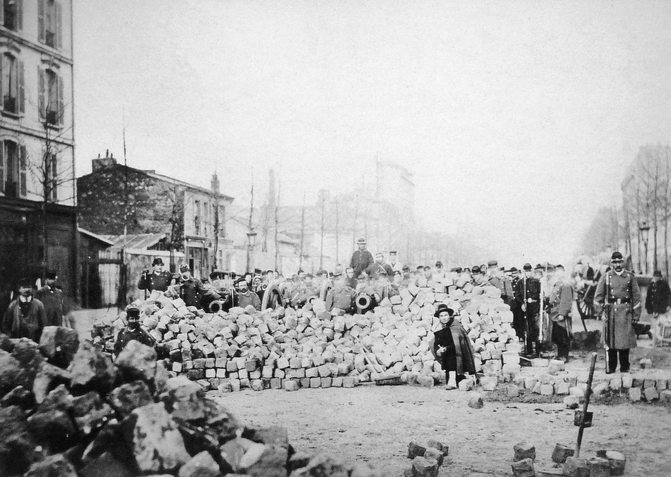 Exposition La Commune de Paris à l'Hôtel de Ville de Paris (18 mars - 28 mai 2011) - Barricade rue d'Allemagne, aujourd'hui rue Jean-Jaurès, au carrefour avec la rue de Sébastopol, aujourd'hui rue Lally-Tollendhl - Bibliothèque historique de la Ville de Paris.